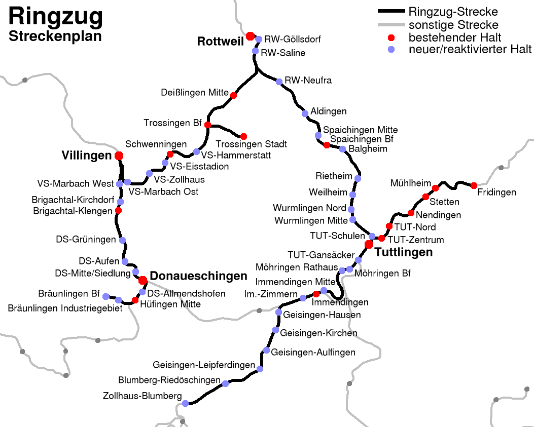 Netzplan des Ringzugs